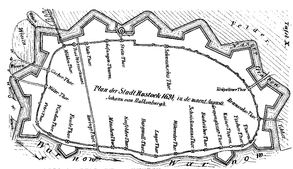 Plan der Fortifikation Rostocks von 1624 von Valkenburg. In dieser Form wurde sie nicht ausgeführt